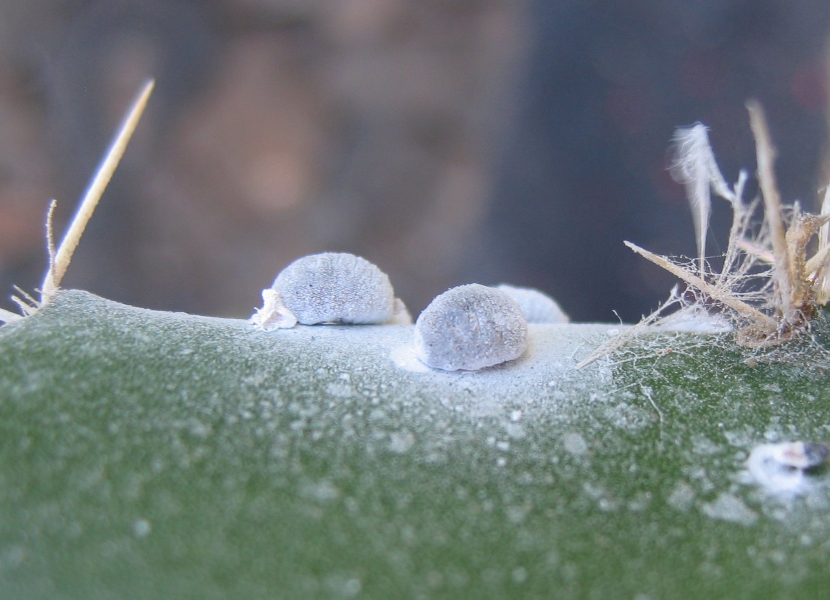 Makroaufnahme von Cochenillenschildläusen